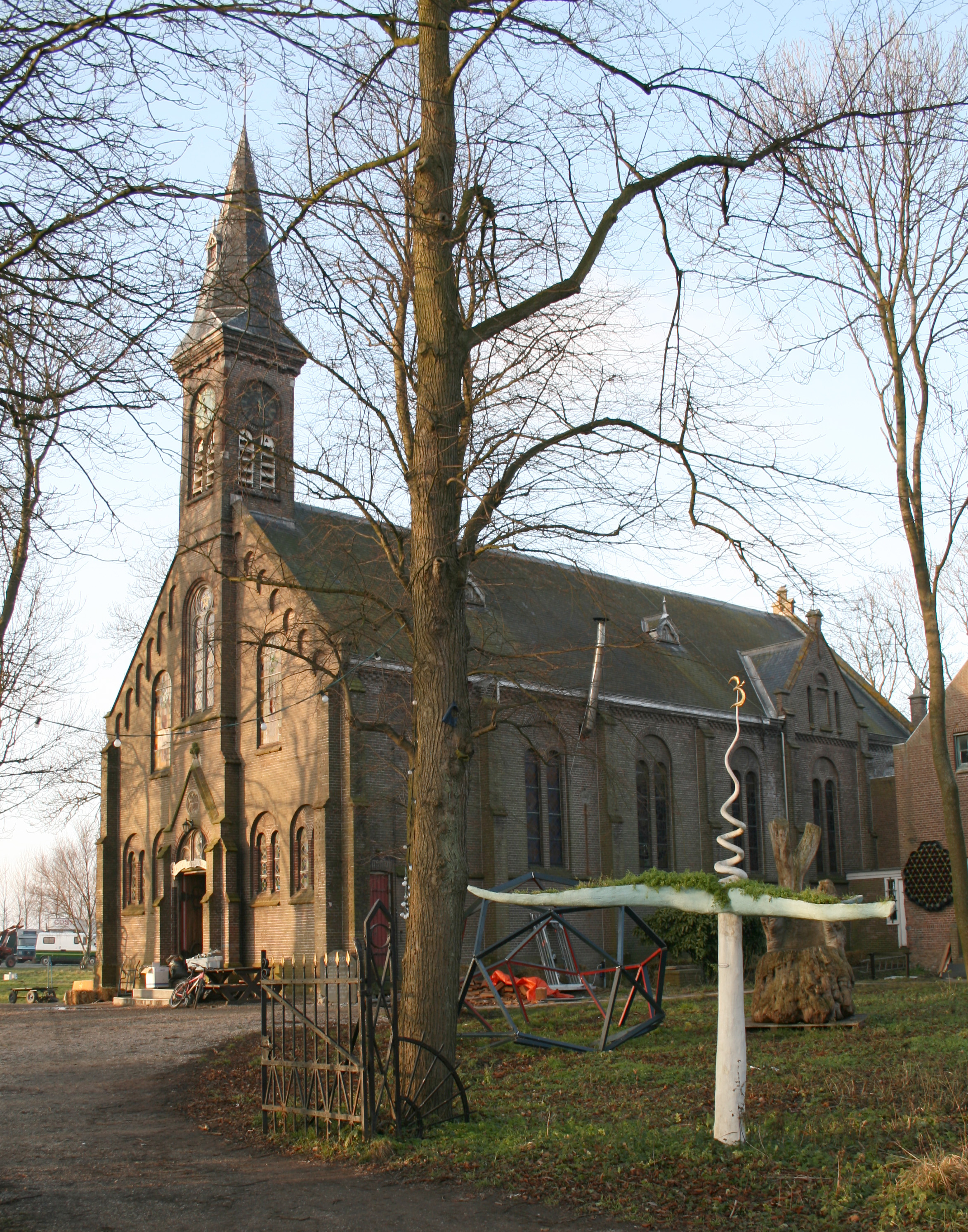 Ruigoord, Amsterdam.